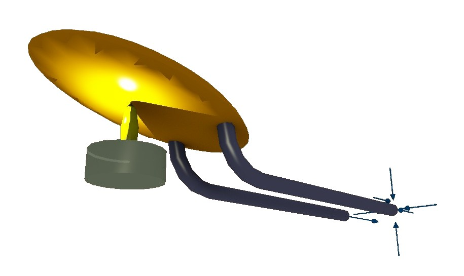 Bildbeschreibung: Knatterboot von unten put-put-boat Quelle: selbst gerendert mit Wings 3D und yafray Fotograf: Lokilech Datum: März 2006 22:00, 13. Mär 2006 Kolling 1024 x 768 (34514 Byte) 23:58, 9. Mär 2006 Lokilech 640 x 480 (49982 Byte) (* Bildbeschreibung: Knatterboot von unten * Quelle: selbst gerendert mit :de:Wings 3D und :de:yafray * Fotograf: Lokilech * Datum: März 2006 GFDL )